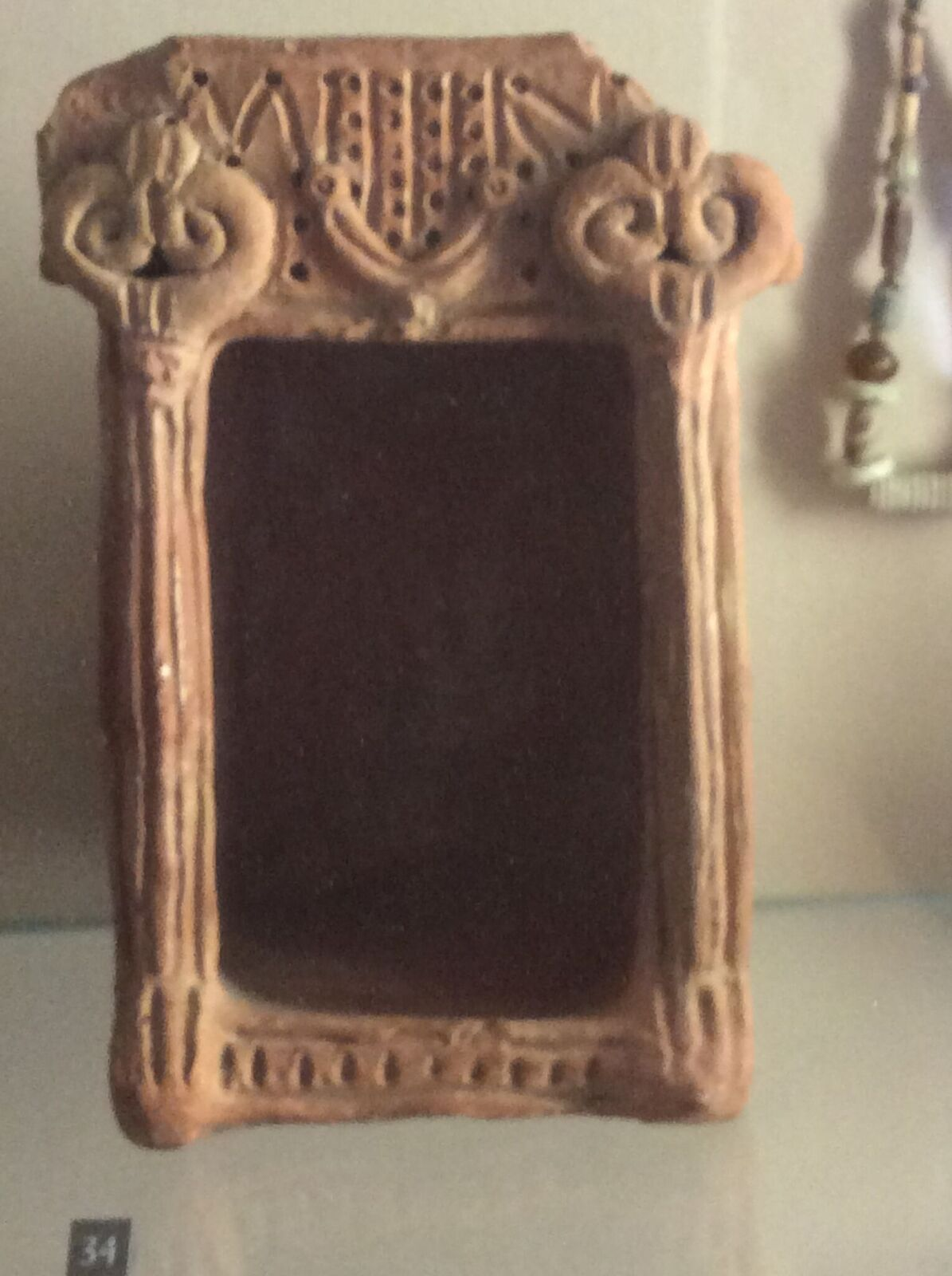 temple israélite Xème siècle av. J.-C., Tell el Far'ah, Musée du Louvre